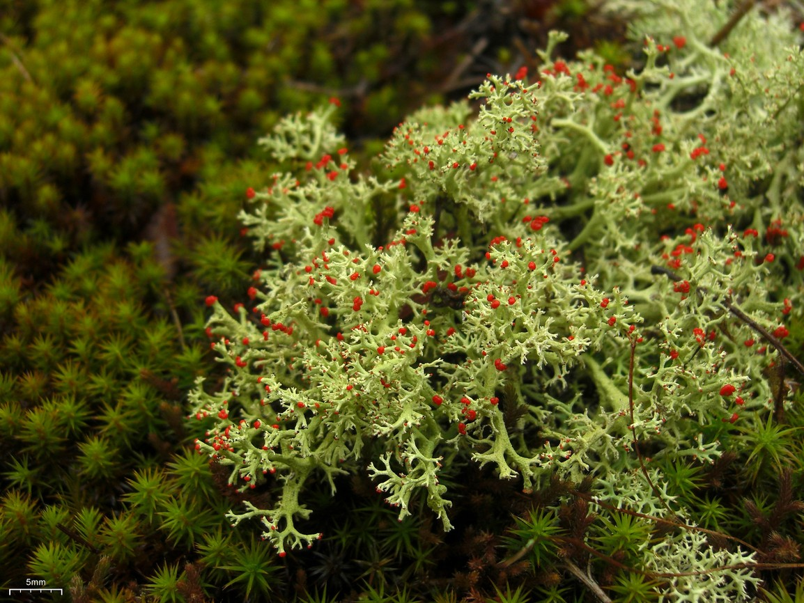 Cladonia leporina 20100311.5 US, GA, near Augusta, Heggie's Rock